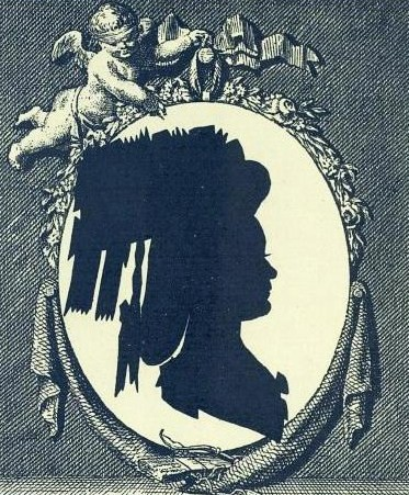 Татьяна Александровна Талызина, в первом браке за М. Я. Гедеоновым (1756—1802), во втором — за тверским губернским предводителем дворянства С. А. Шишкиным.